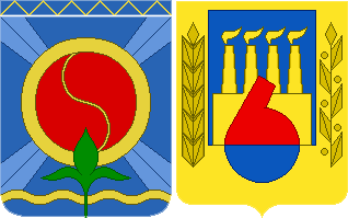 Неофициальные гербы Воскресенска, употреблявшиеся в сувенирной продукции до 1987 года. Первое изображение: реконструкция Ю.Калинкина по фотографии значка с гербом города фабрики "Русский сувенир" 1987 года Второе изображение: рисунок веб-оптимизирован для Ю.Калинкиным по сувенирному значку, выпускаемому В.Березиным